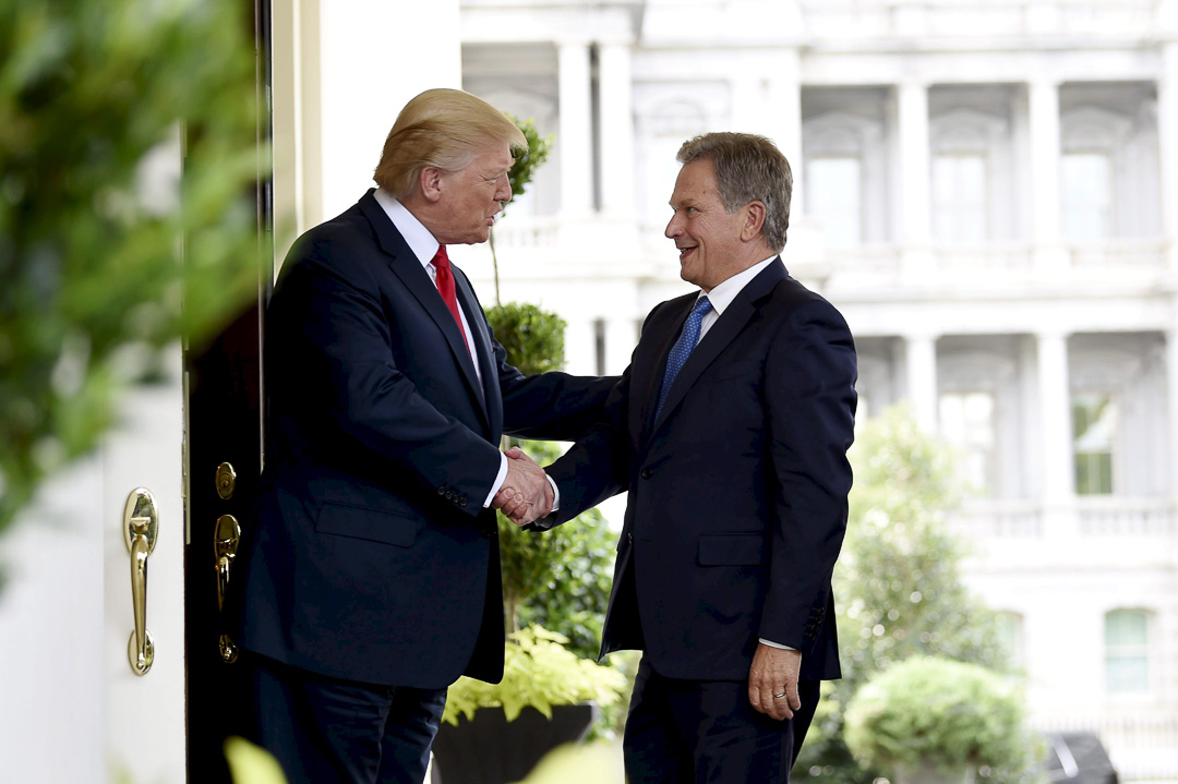 Presidentti Trump tervehtii presidentti Niinistöä Valkoisen talon ovella. Antti Aimo-Koivisto / Lehtikuva